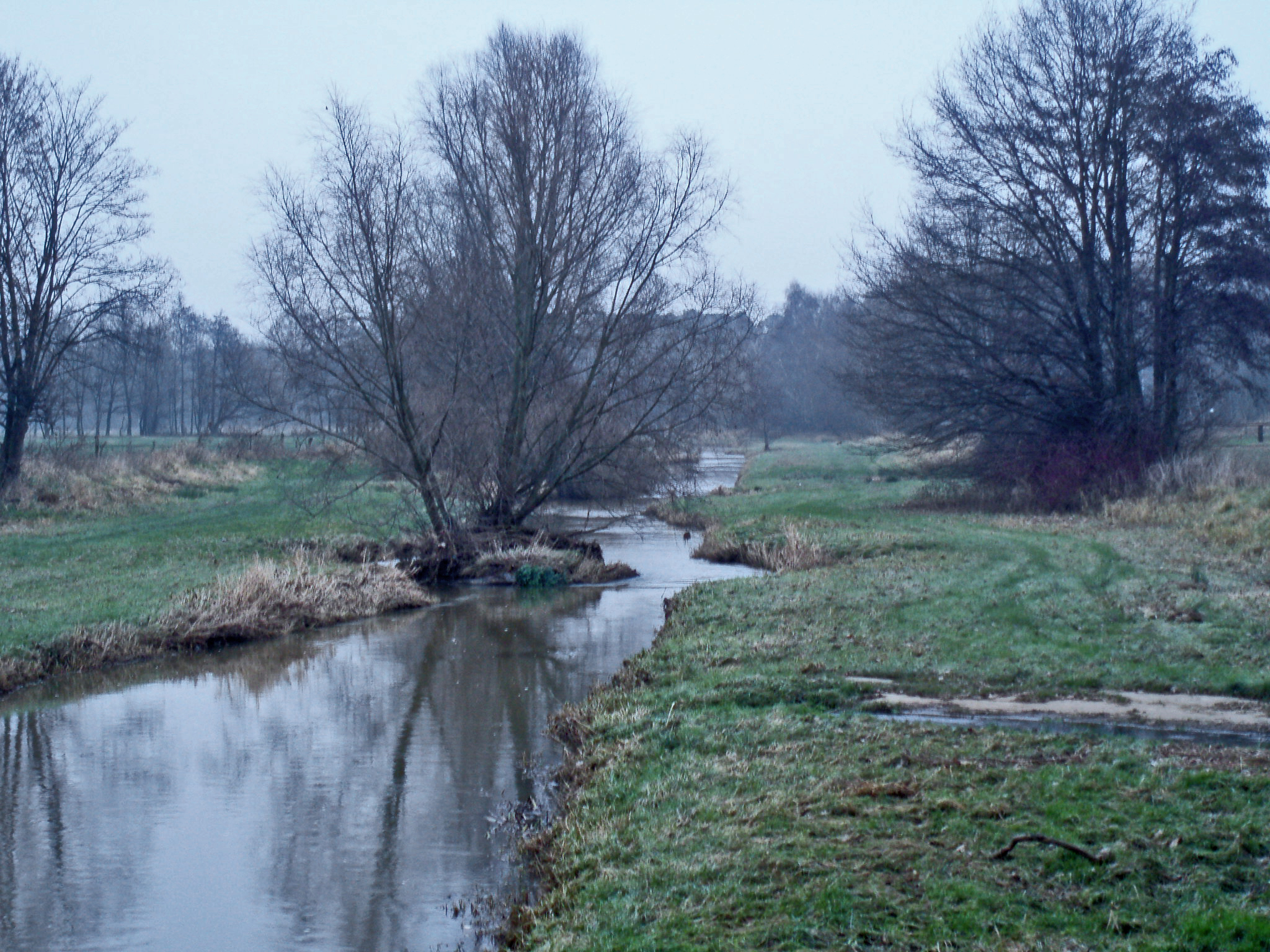 Burgdorfer Aue bei Hülptingsen, Region Hannover, Deutschland